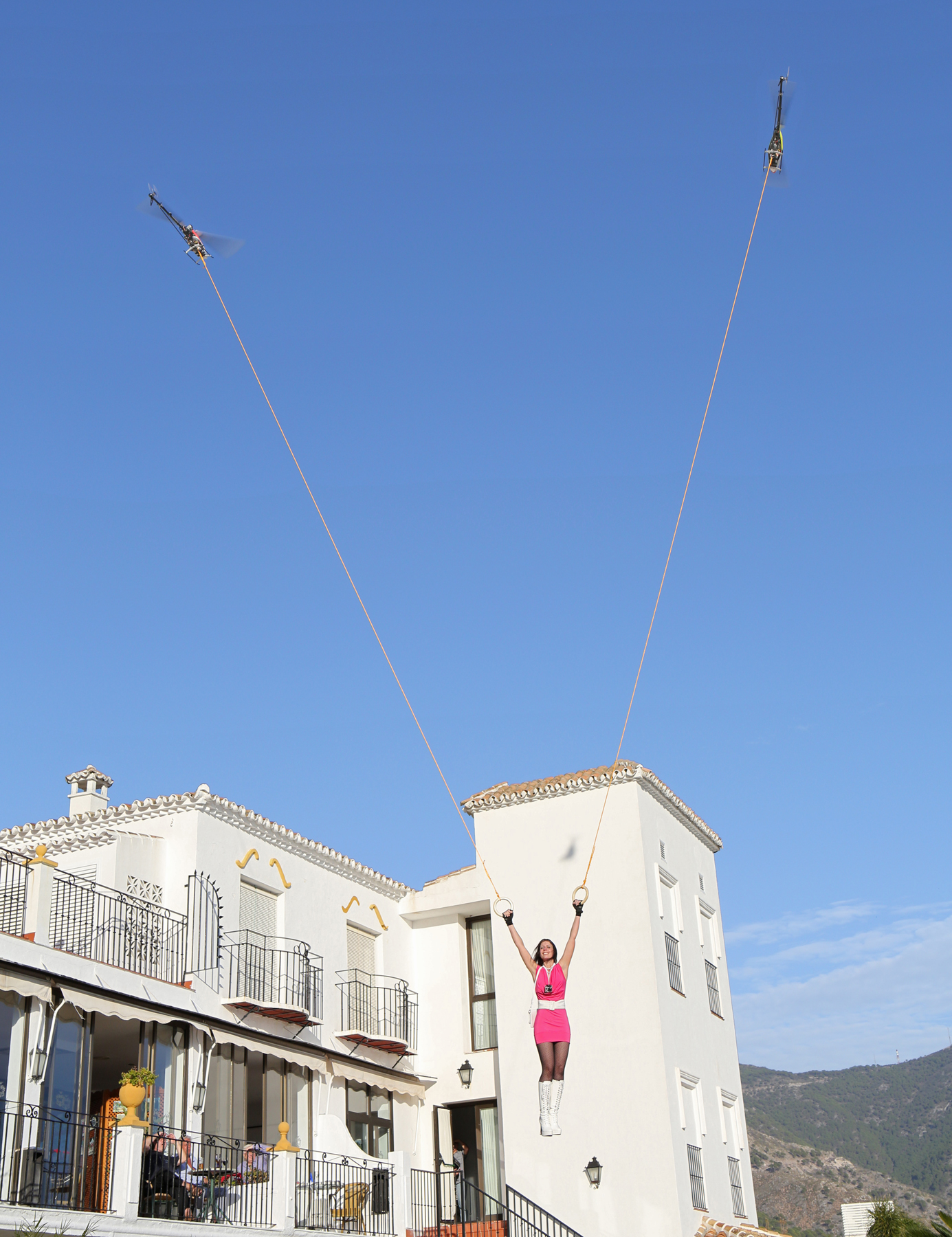 HeliGraphix beim geglückten Rekordversuch 2014 in Spanien, einen Menschen mit zwei RC-Helikoptern in die Luft zu befördern.